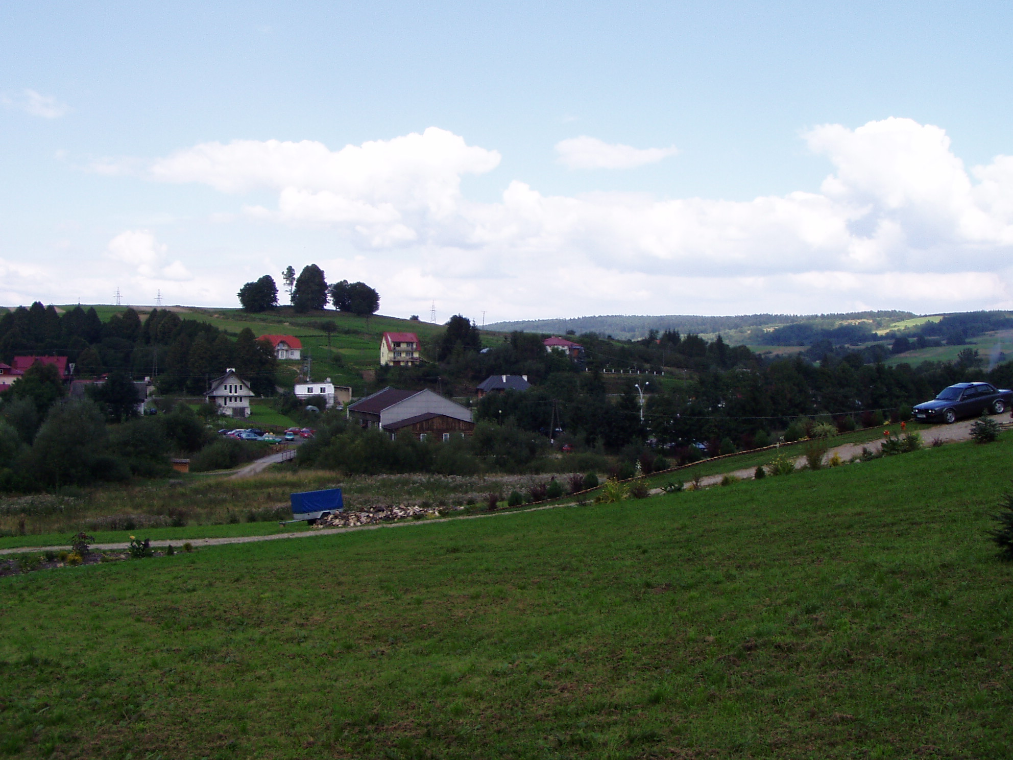 Cerkwisko w/in Stara Bircza